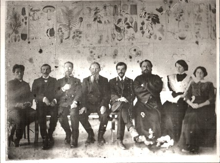 Преподаватели Бродокалмакского Высшего педучилища для подготовки учителей начальных классов (слева направо): Паньков Валентин Фёдорович - ветеринарный врач, вёл уроки санитарии и гигиены. Мальгин Николай Александрович - преподаватель математики. Малицкий Владимир Александрович - преподаватель биологии. Брагин Василий Евграфович - попечитель училища, член Государственной думы. Никулин Константин Николаевич - директор Высшего педучилища. Отец Михаил (Золотавин Михаил Иванович) - преподаватель закона божия, священник, директор церковно-приходской школы, руководитель церковного хора. Шмакова Зинаида Константиновна - преподаватель истории и географии, вела кружок бальных танцев. Никулина Пелагея Ивановна - преподаватель русского языка и литературы.